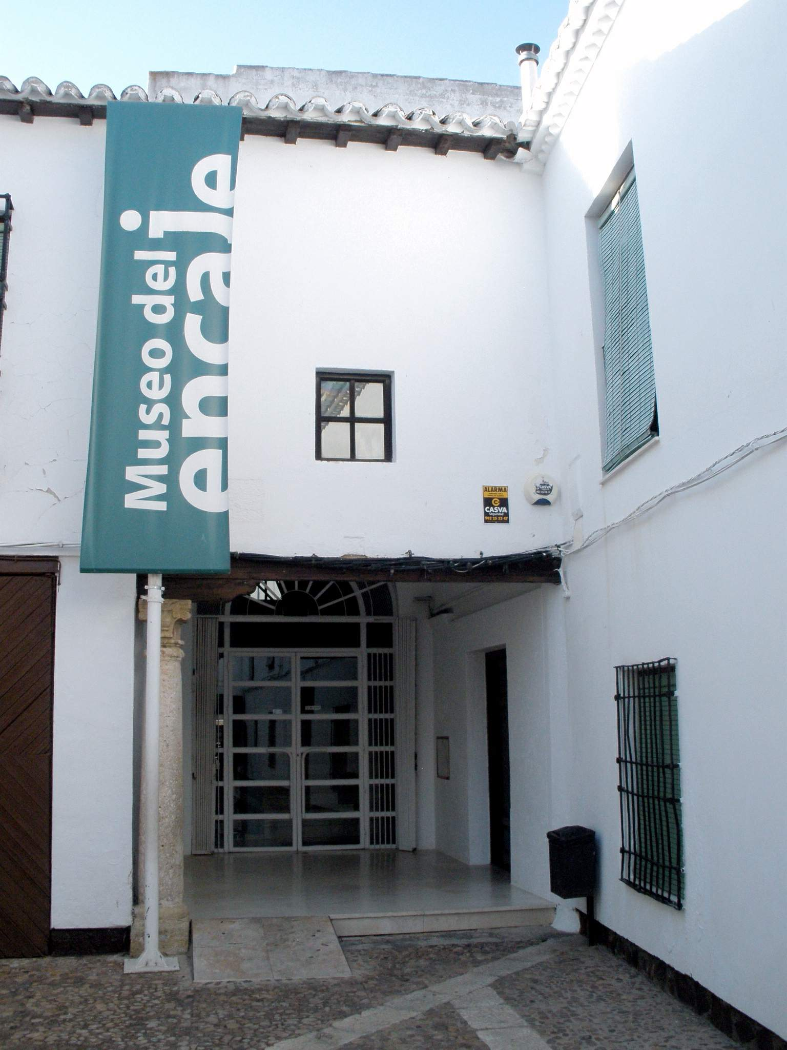 Museo del Encaje de Almagro (Ciudad Real)